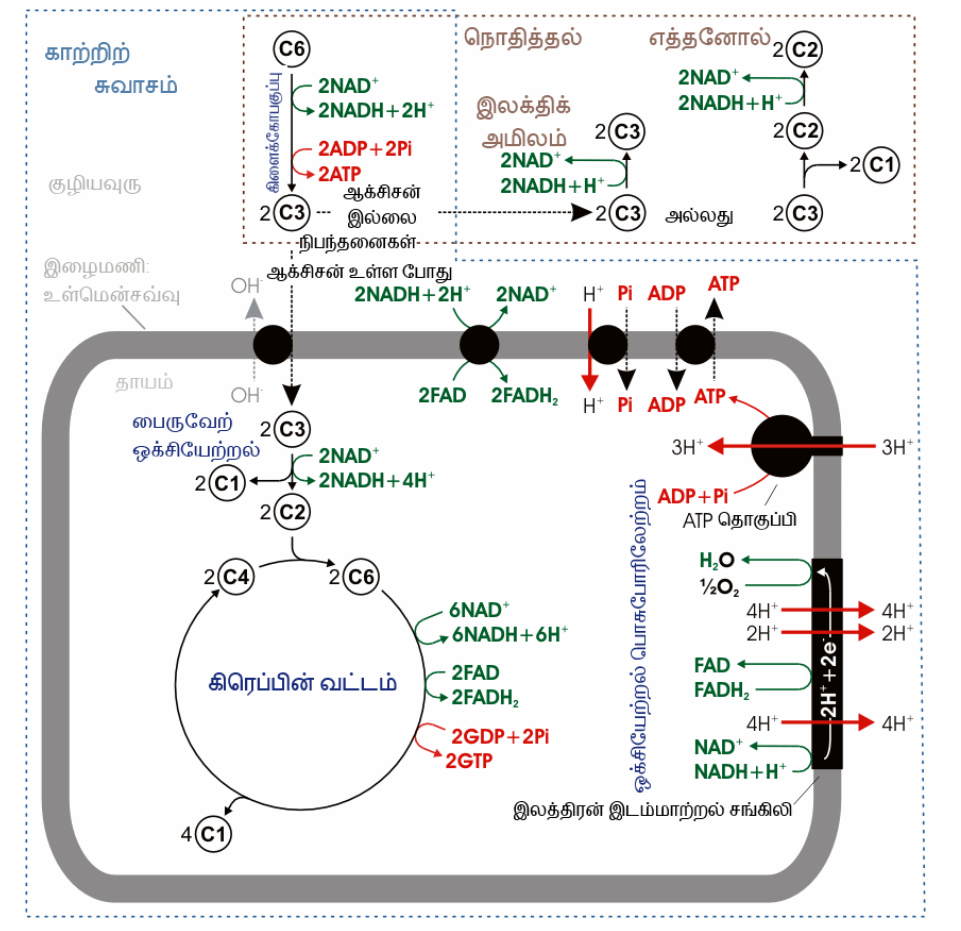 கலச்சுவாச வகைகளான காற்றிற் சுவாசத்துக்கும் நொதித்தலுக்கும் இடையிலான ஒப்பீடு.